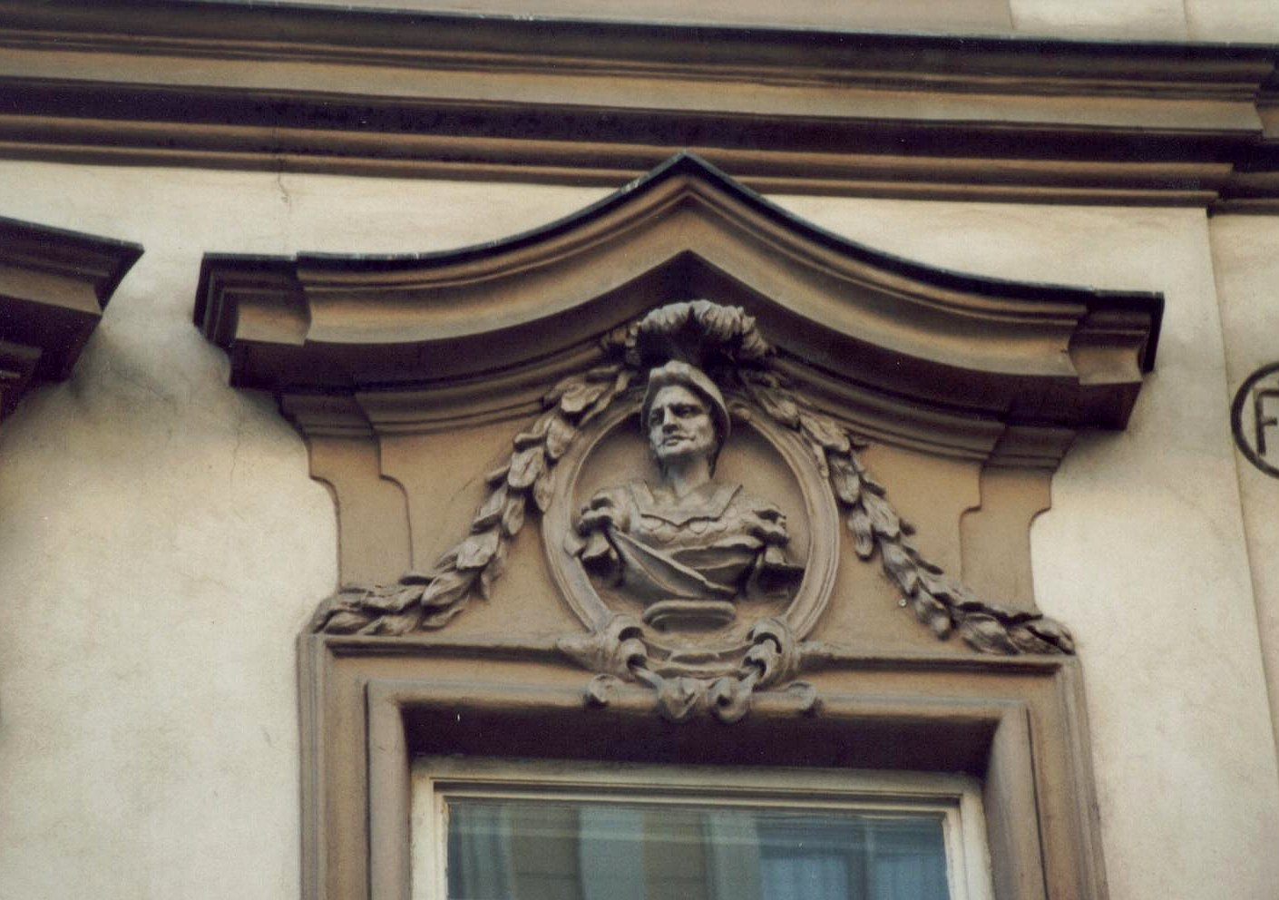 Detail průčelí Hrzánského Paláce v Praze, Celetné ulici, G. B. Alliprandi (1702–10)